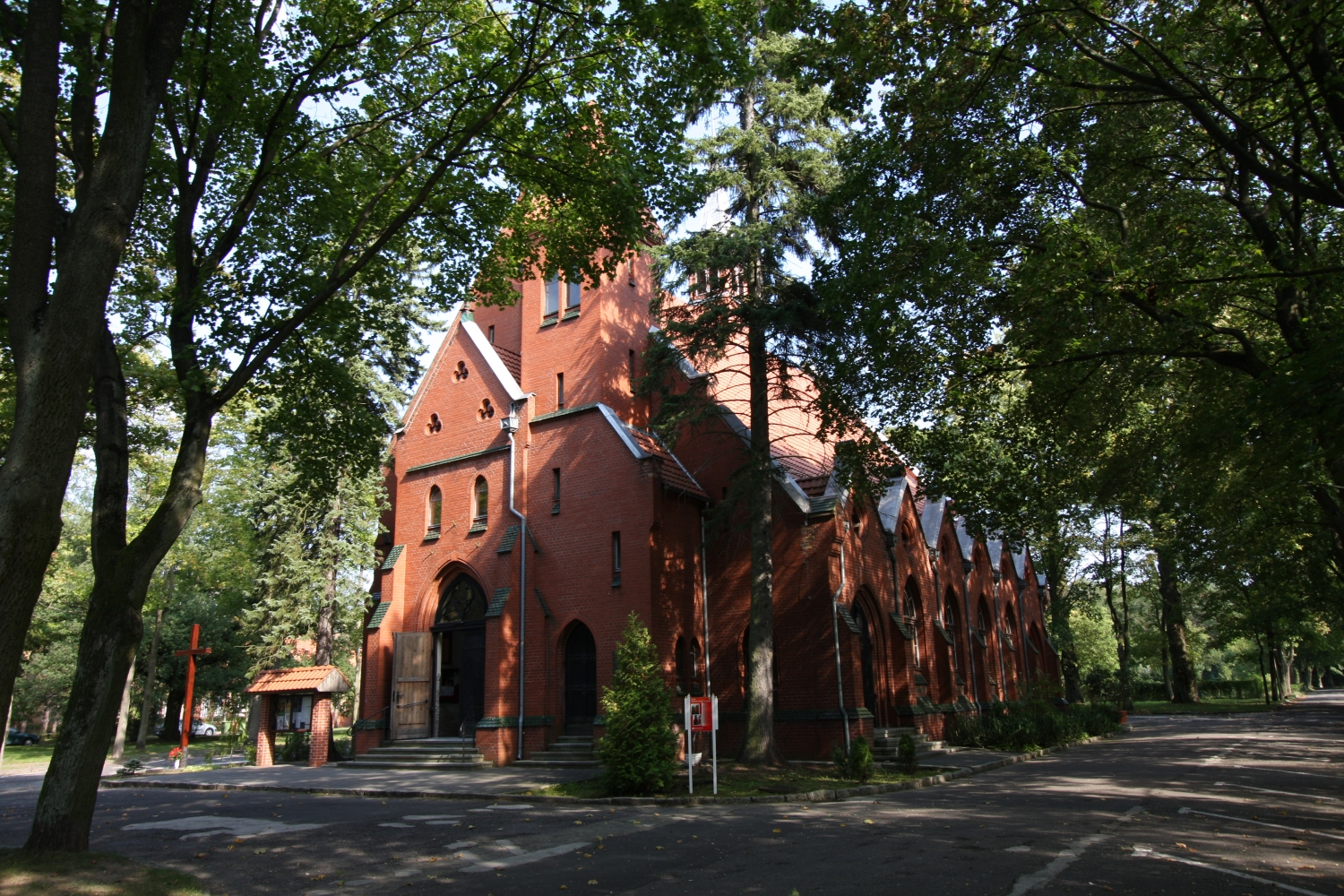 Międzyrzecz ul. Poznańska, kościół, ob. fil. p.w. Niepokalanego Poczęcia NMP, w zespole szpitala psychiatrycznego, mur., 1901-1914, ul. Poznańska 109 (zabytek nr rejestr. 391/92)